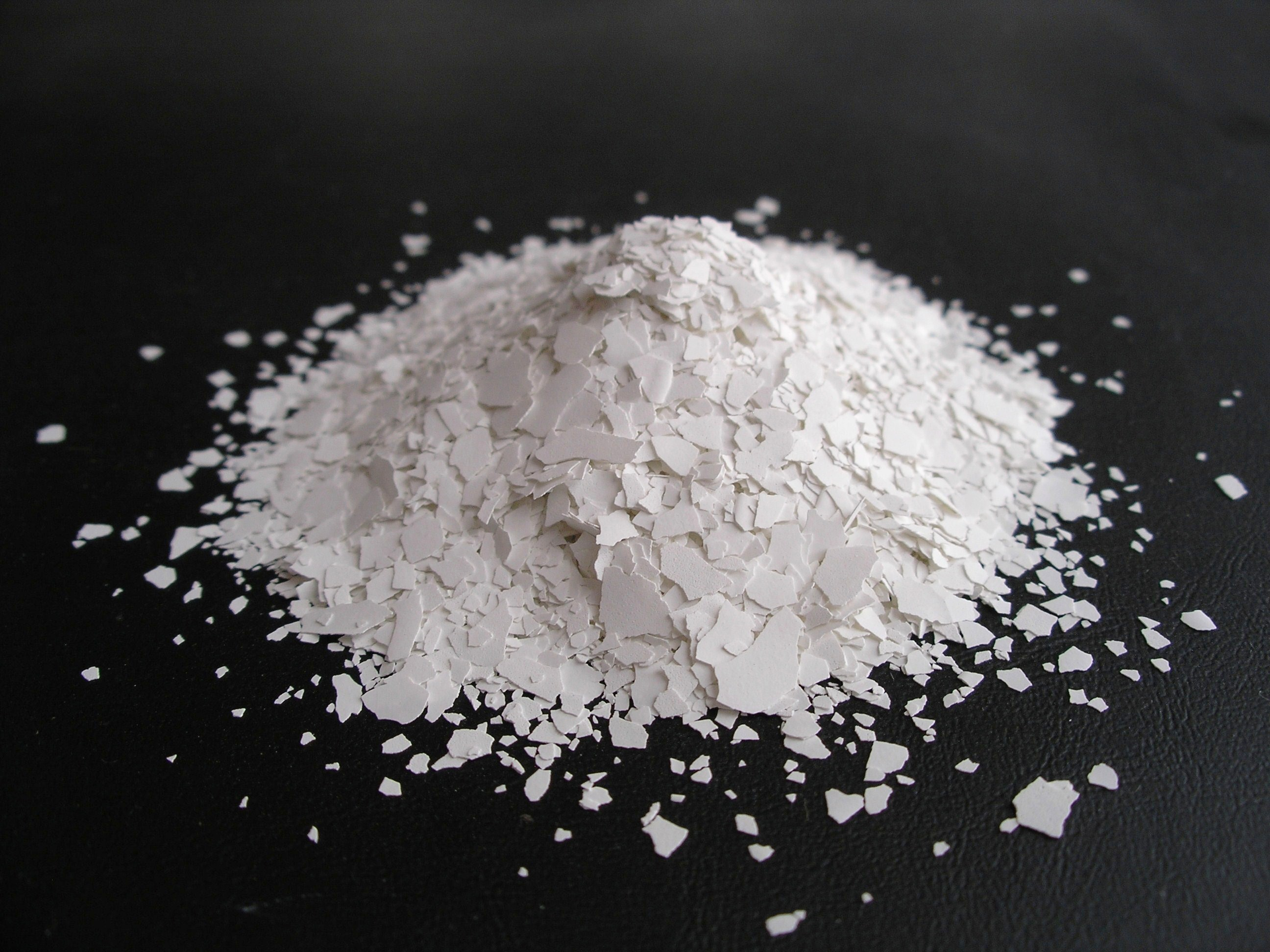 Colorchips DecoChips bílá